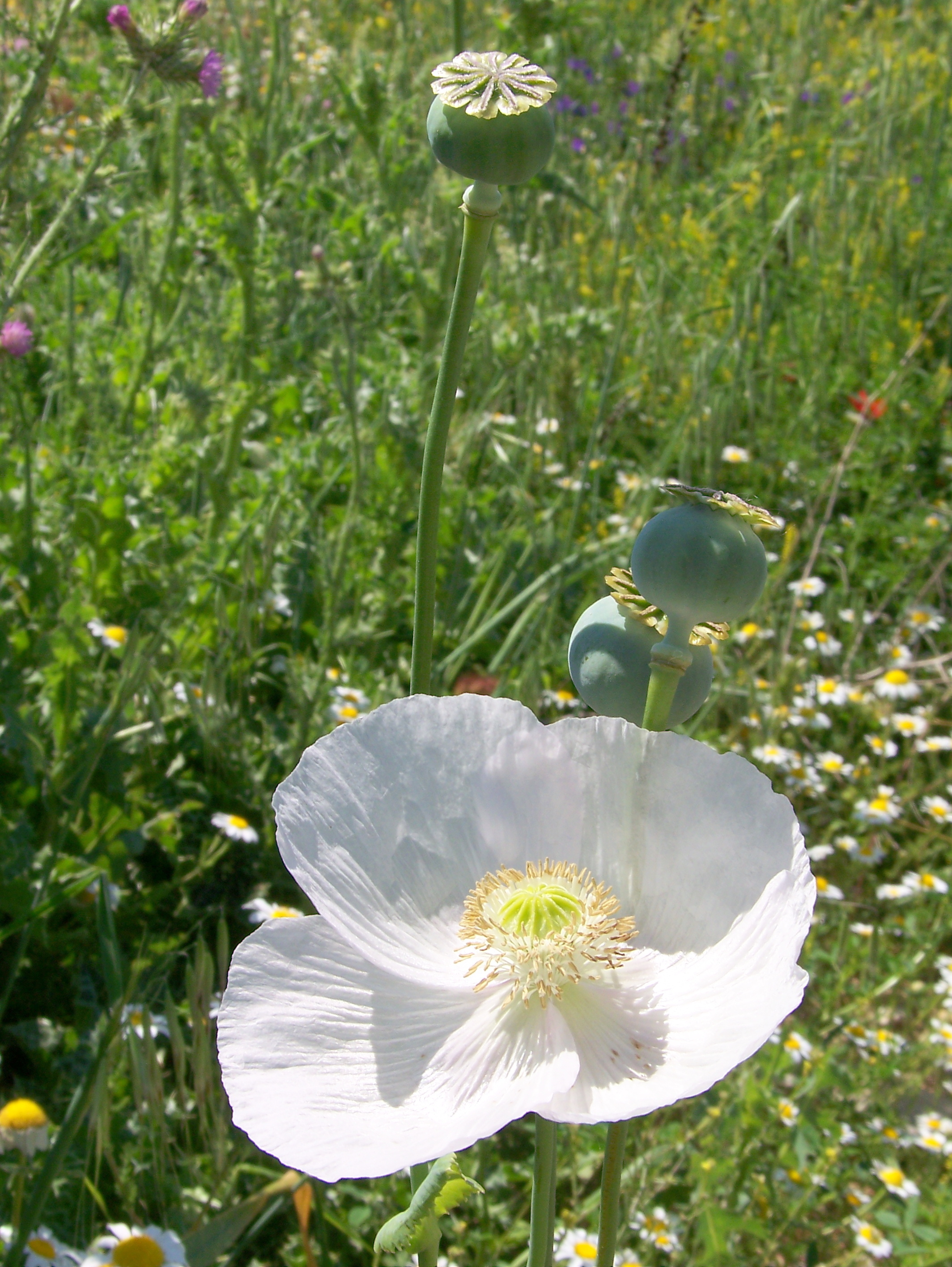 Papaver somniferum (var. blanca) - Rejas, circa Arroyo/Estanques, Áridos Cobo & Hijos, (Madrid, España)